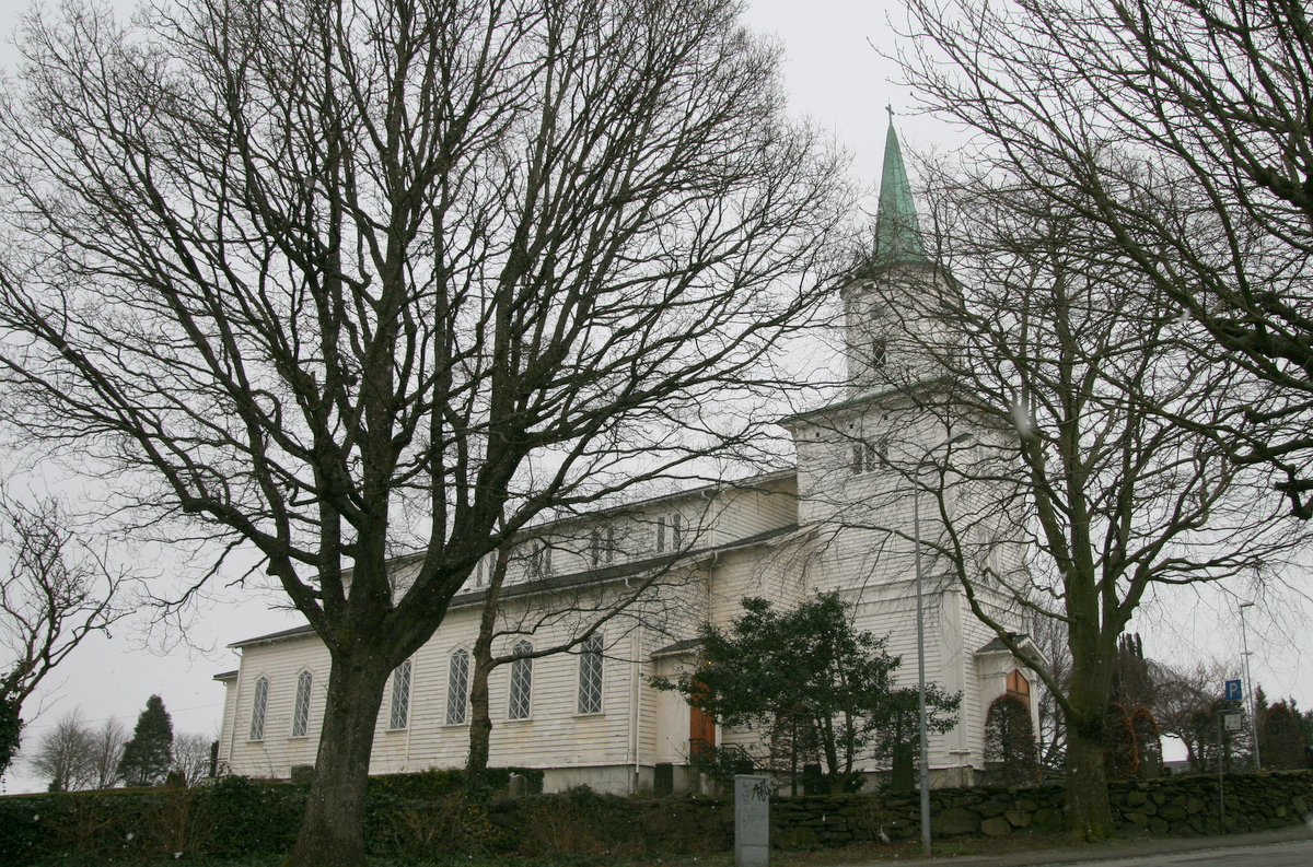 Frue kirke